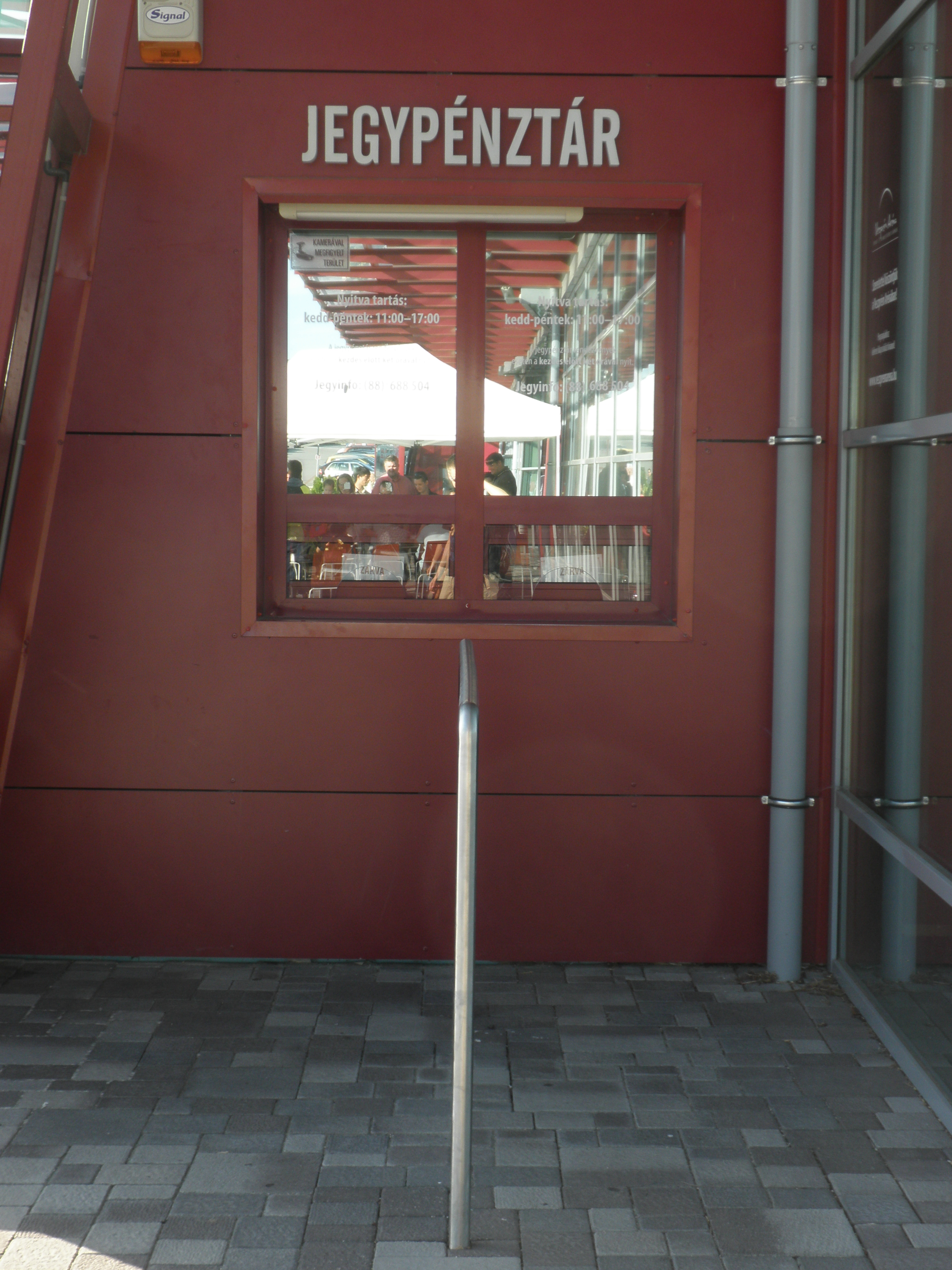 jegypénztár